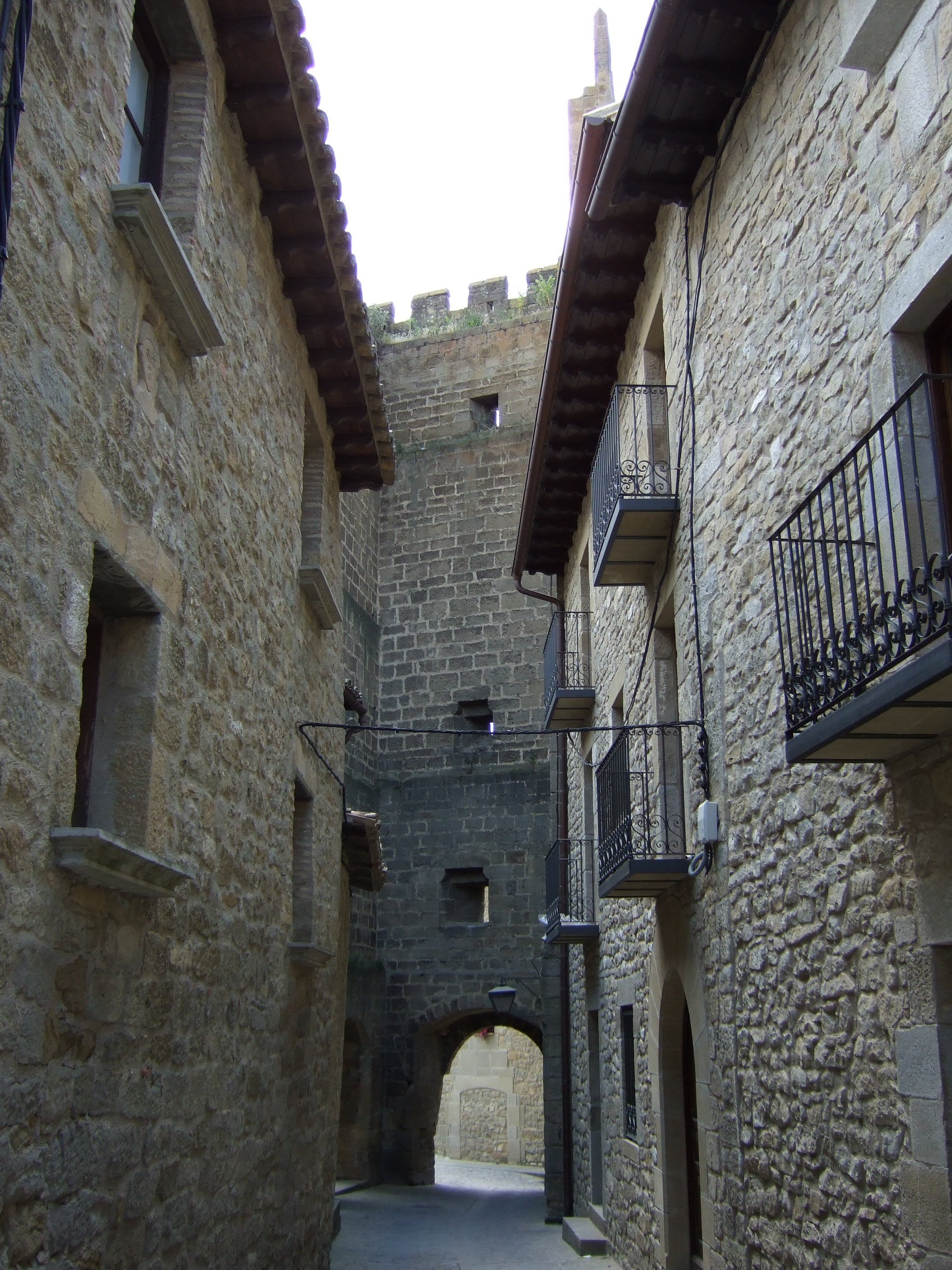 Sos del Rey Católico - Puerta de las murallas